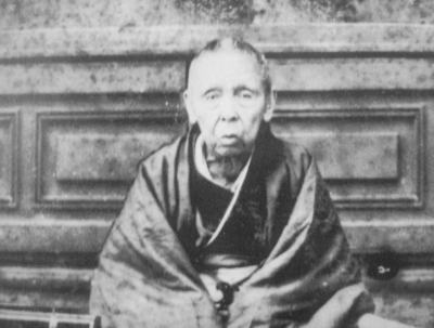 黒澤止幾肖像写真